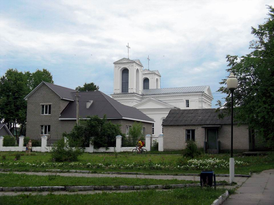 Беларуская (тарашкевіца): Лепель